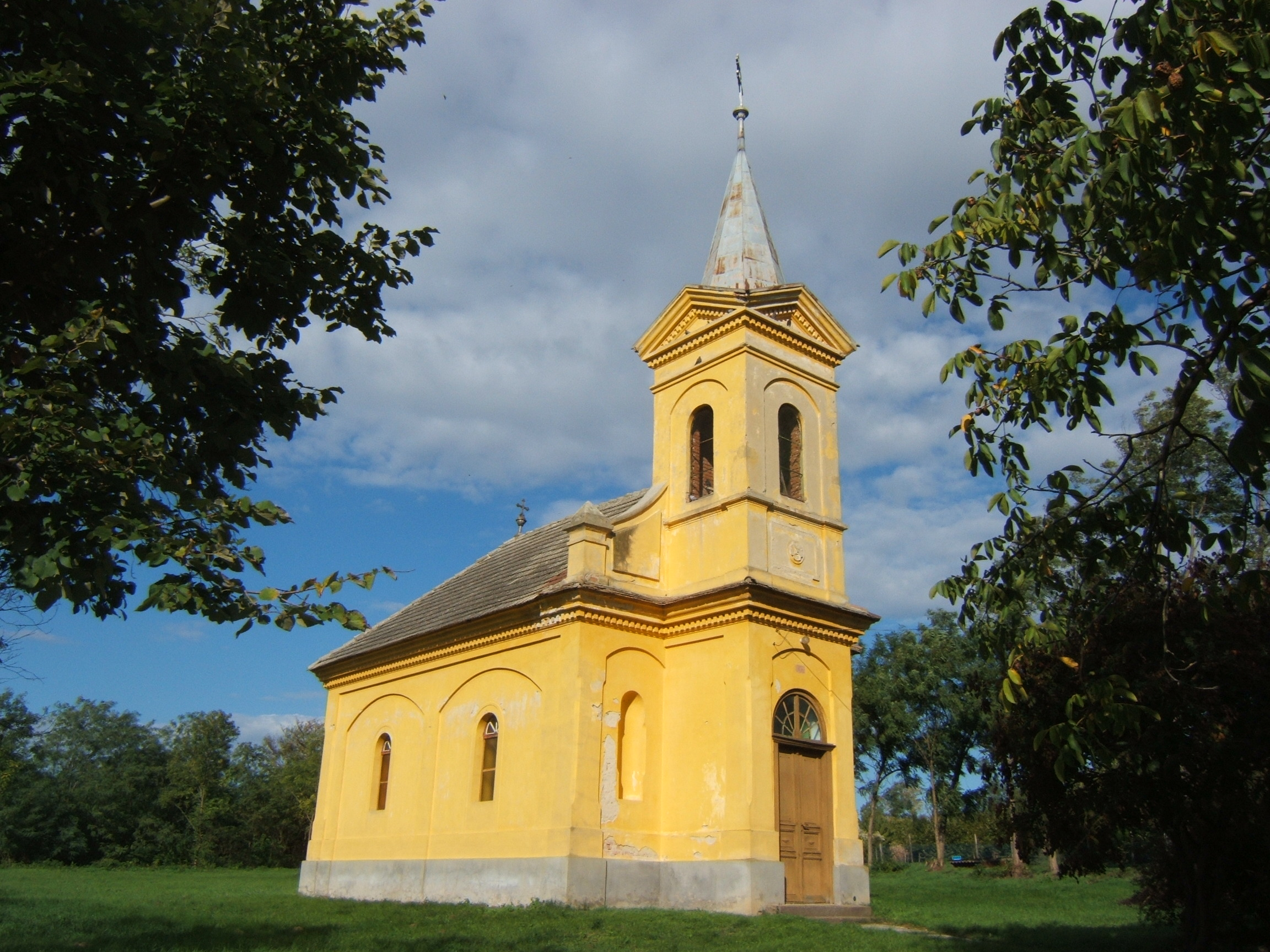 Somogyacsa, gerézdpusztai kápolna